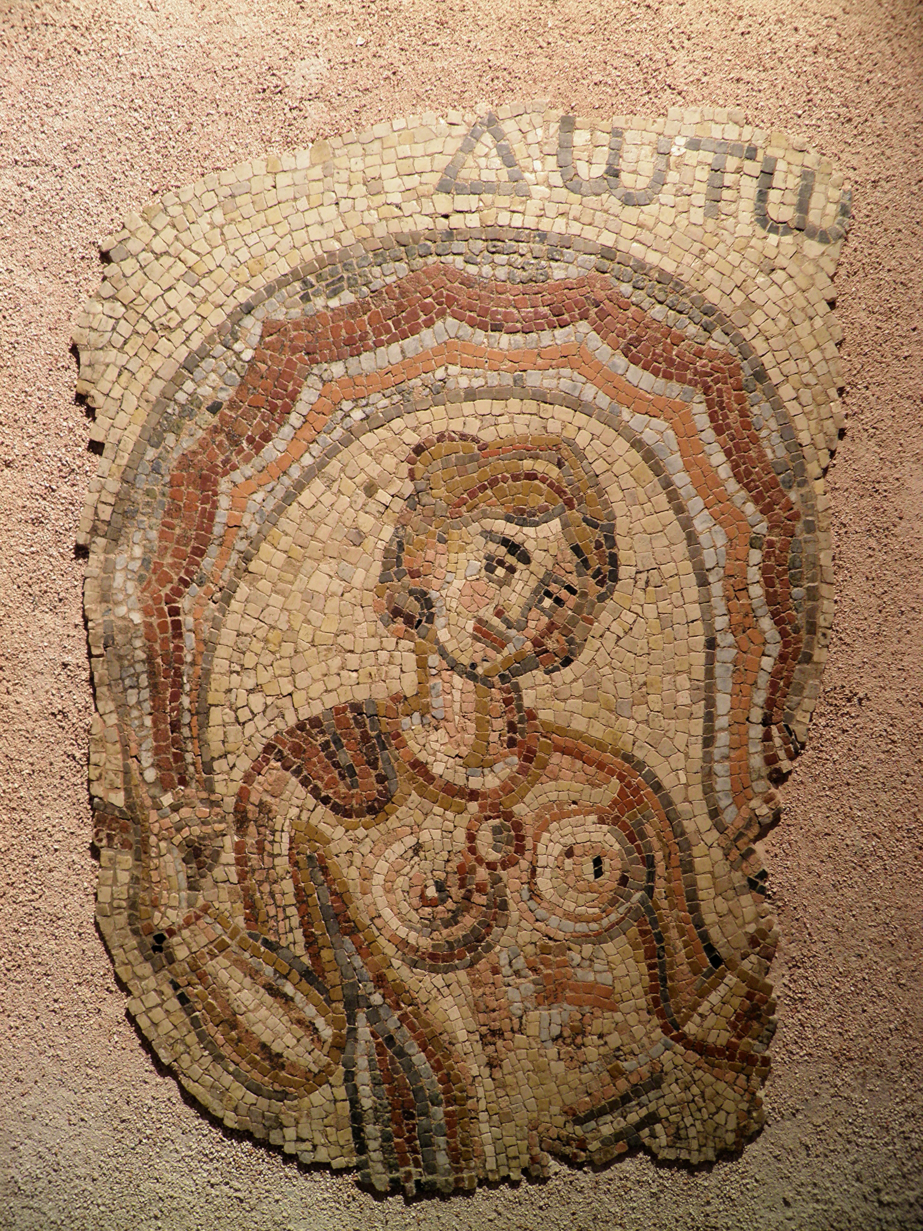 Fragment de mosaïques provenant d’une villa romaine, un domaine agricole qui comprenait une partie résidentielle somptueuse. De ce domaine, on ne connaît que le plan de la salle qui avait reçu ce pavement, au IVe ou au Ve siècle. La salle, longue de 13 m et large de 3 m, était agrémentée de six absides. On pense qu’il s’agissait du vestiaire d’un complexe thermal : l’apodyterium. Sur ce fragment, figure une nymphe au-dessus de laquelle on peut lire le nom : « Dotô » ; mais ce nom fut placé ici lors d’une restauration de la mosaïque et n’est sans doute pas celui de la nymphe. Il s’agirait plutôt de « Ino » dont l’époux fut rendu fou par la déesse Héra. Pour lui échapper, Ino se jeta dans la mer où elle rejoignit le cortège des Néréides et fut divinisée. Elle prit alors le nom de Leucothée. Dans la mythologie grecque, Ino (en grec ancien Ἰνώ / Inố), fille de Cadmos, fondateur de la célèbre cité de Thèbes, et d'Harmonie, est la seconde épouse d'Athamas, de qui elle a deux fils, Léarque et Mélicerte. In Greek mythology Ino was a mortal queen of Thebes, who after her death and transfiguration was worshiped as a goddess under her epithet Leucothea, the "white goddess." Alcman called her "Queen of the Sea", which, if not hyperbole, would make her a doublet of Amphitrite.